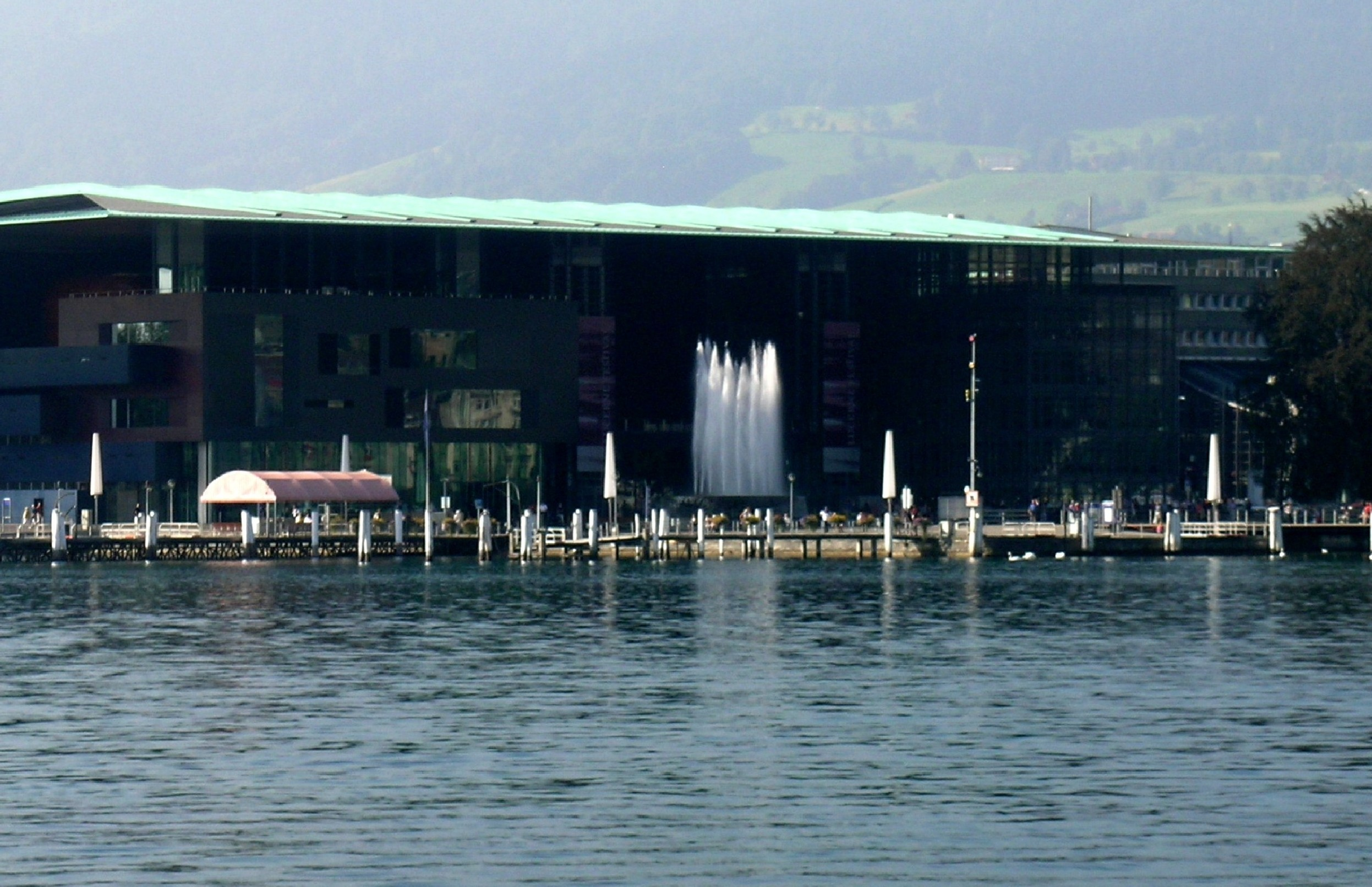 Luzerner Konzerthaus Seeseite